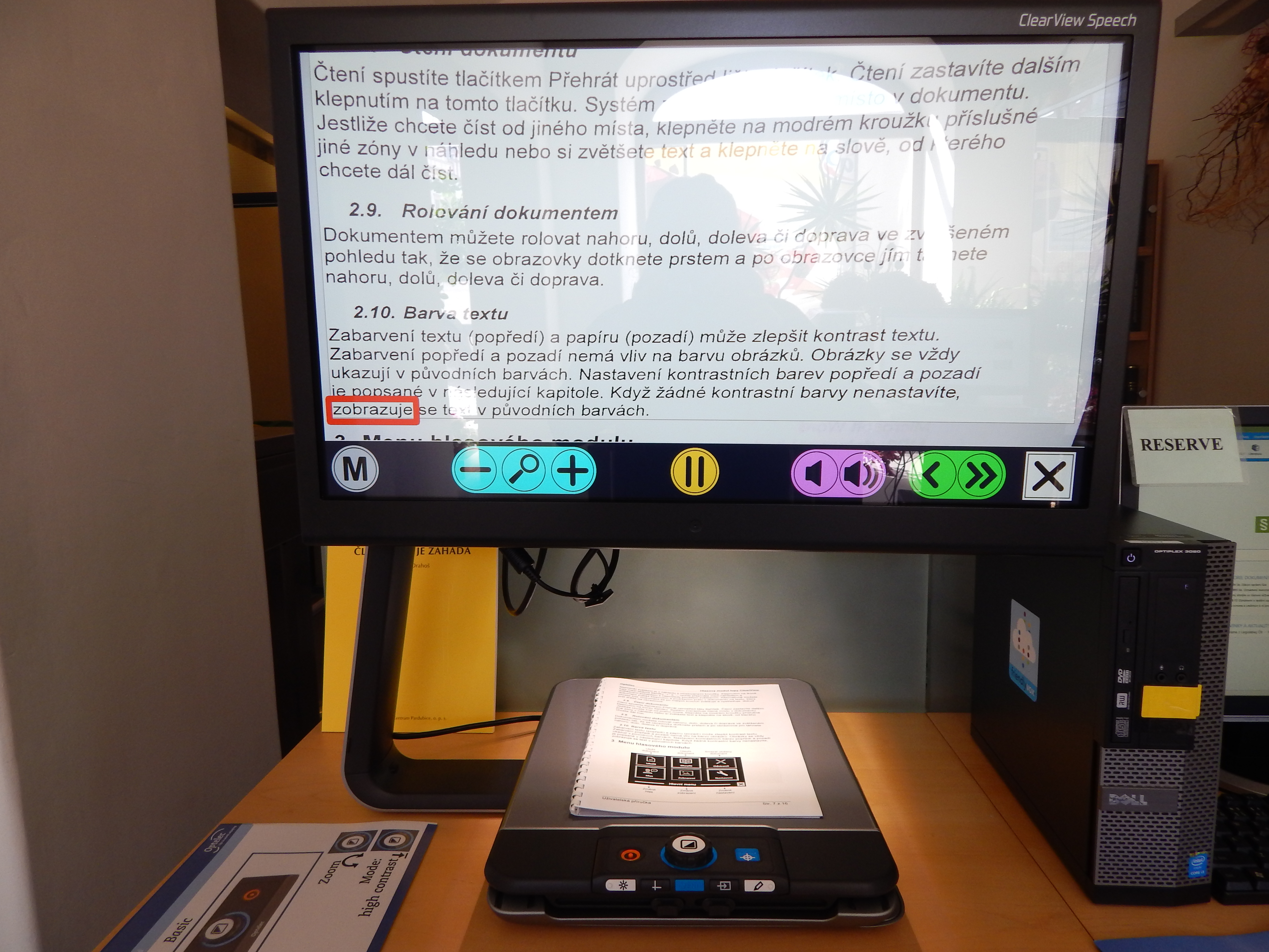 stolní kamerová lupa s hlasem, Krajská knihovna v Pardubicích, informační oddělení, duben 2019